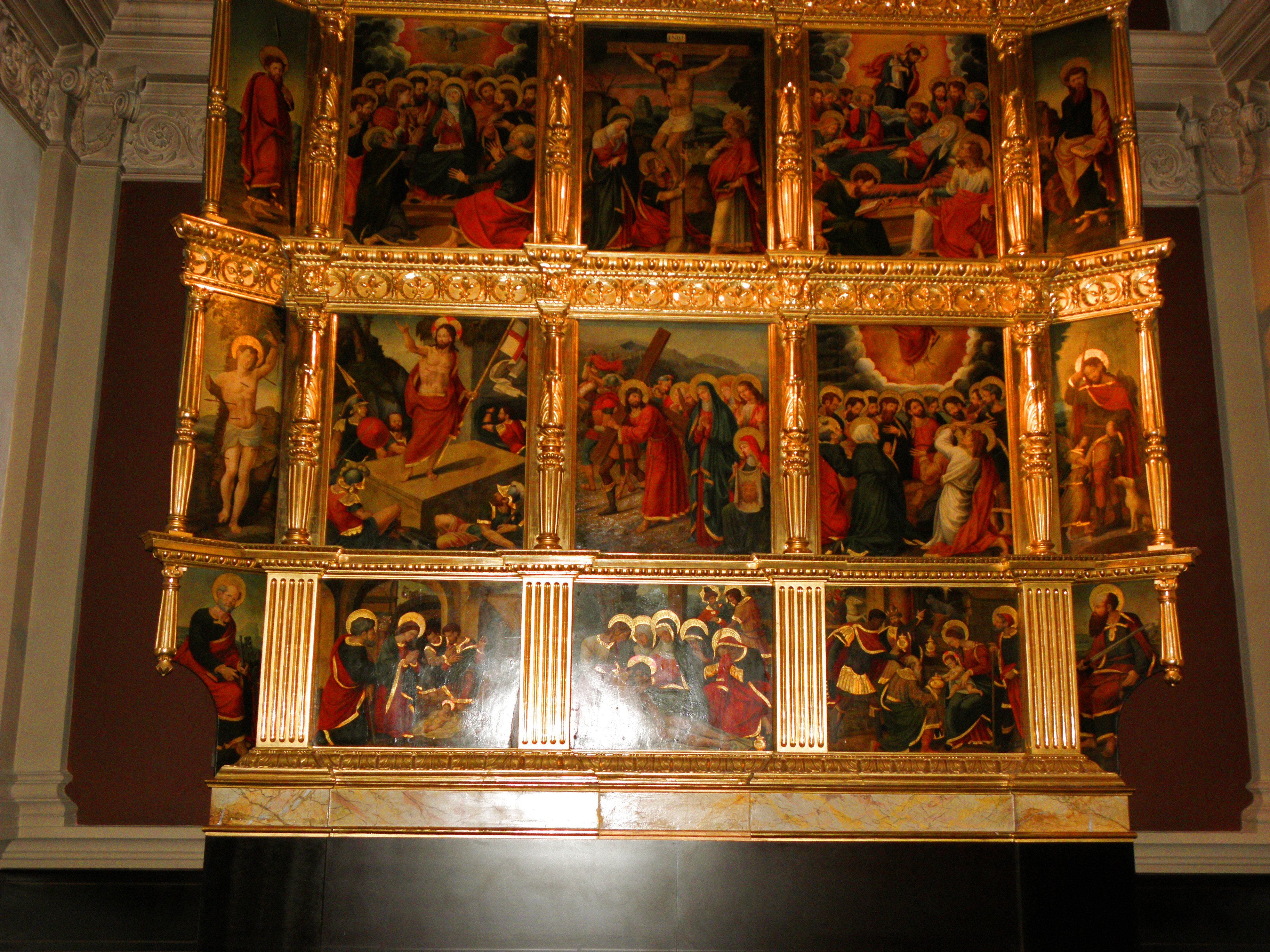 Santuari del Miracle (Riner, Solsonès). Part inferior del retaule gòtic dela capella del Santíssim.